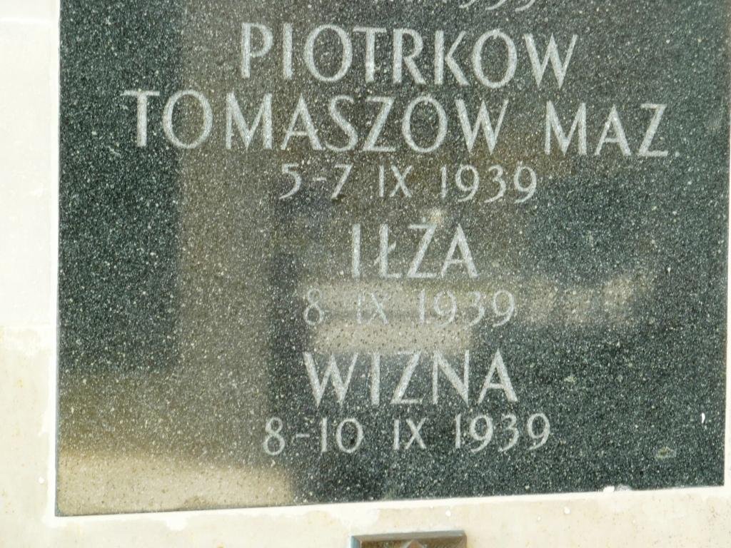 Grób Nieznanego Żołnierza w Warszawie - fragment tablicy, na której upamiętnione zostały walki w obronie Wizny w 1939 r.